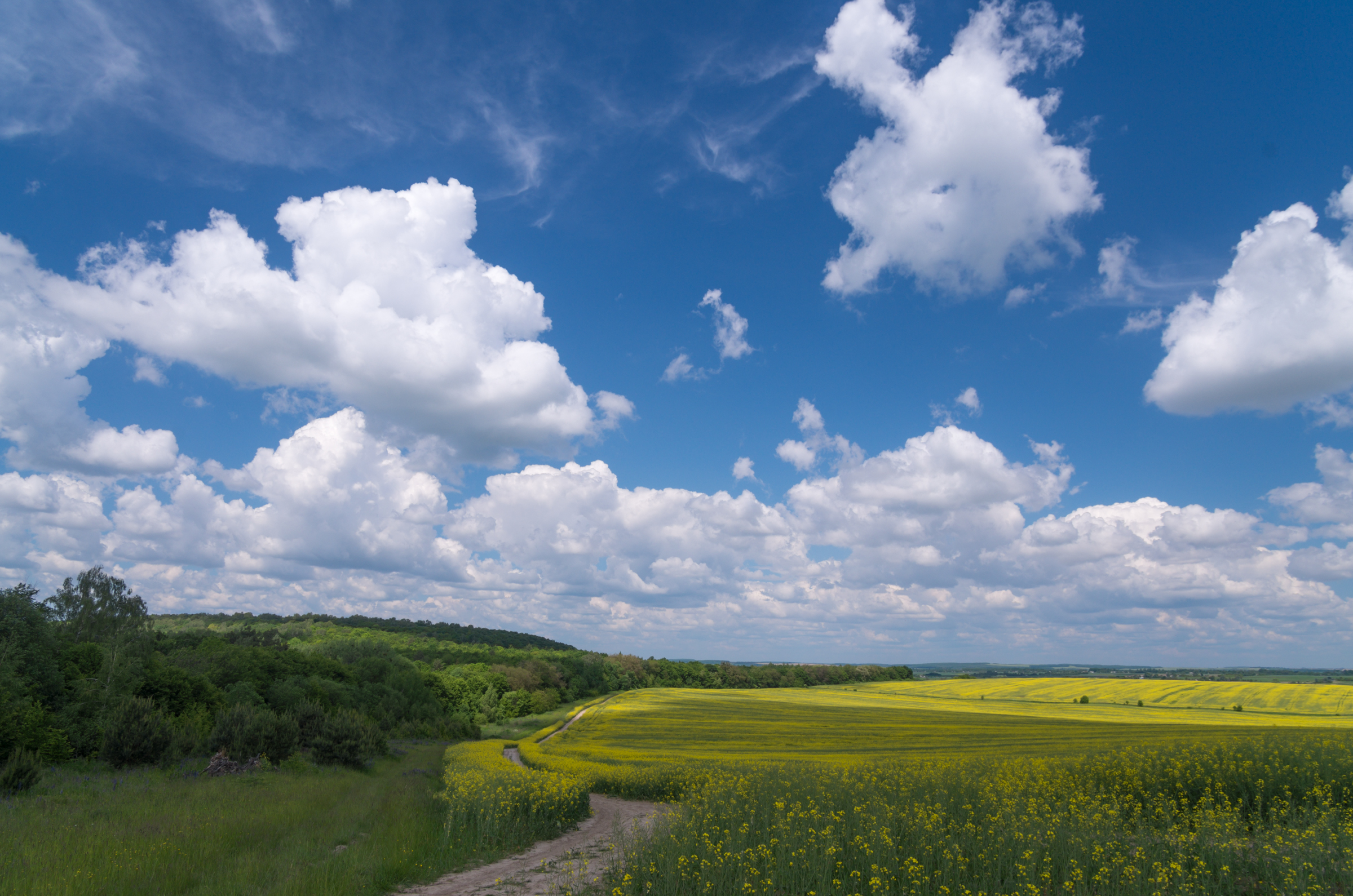 Нараїв, Здолбунівський район, Мостівське л-во: кв. 6